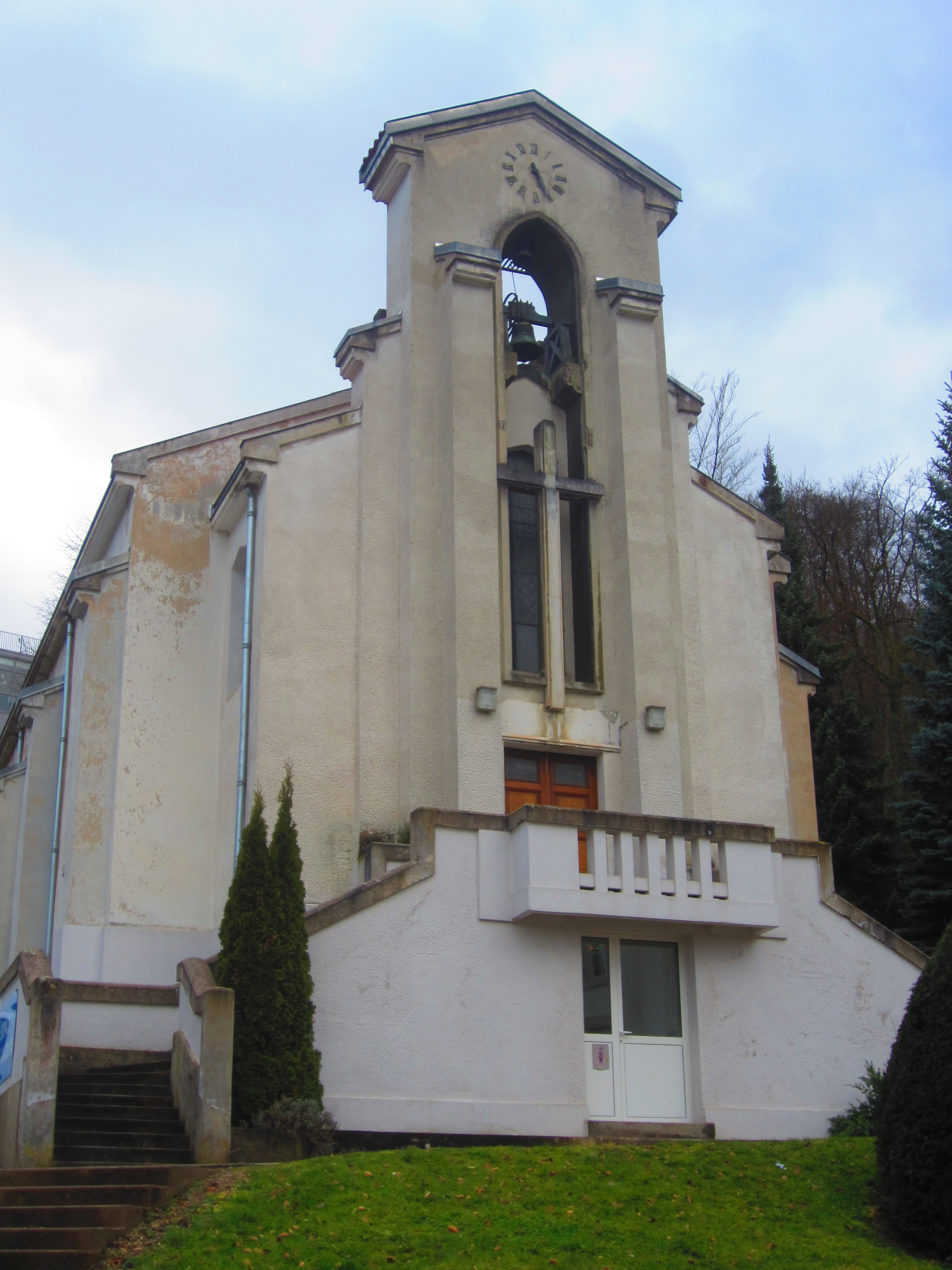 Maxeville chapelle institut thiery